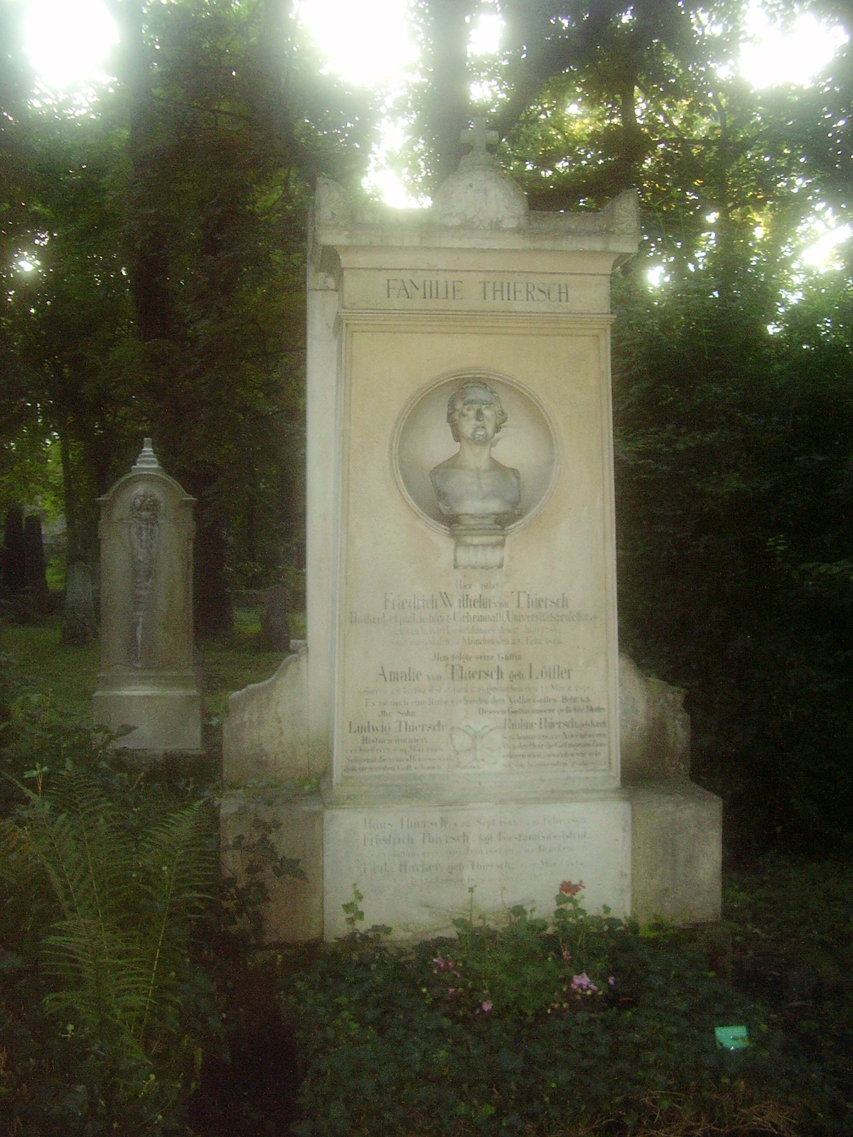 Grab der Familie Friedrich Wilhelm von Thiersch (* 17. Juni 1784 in Kirchscheidungen bei Freyburg; † 25. Februar 1860 in München), „Praeceptor Bavariae“, deutscher Philologe